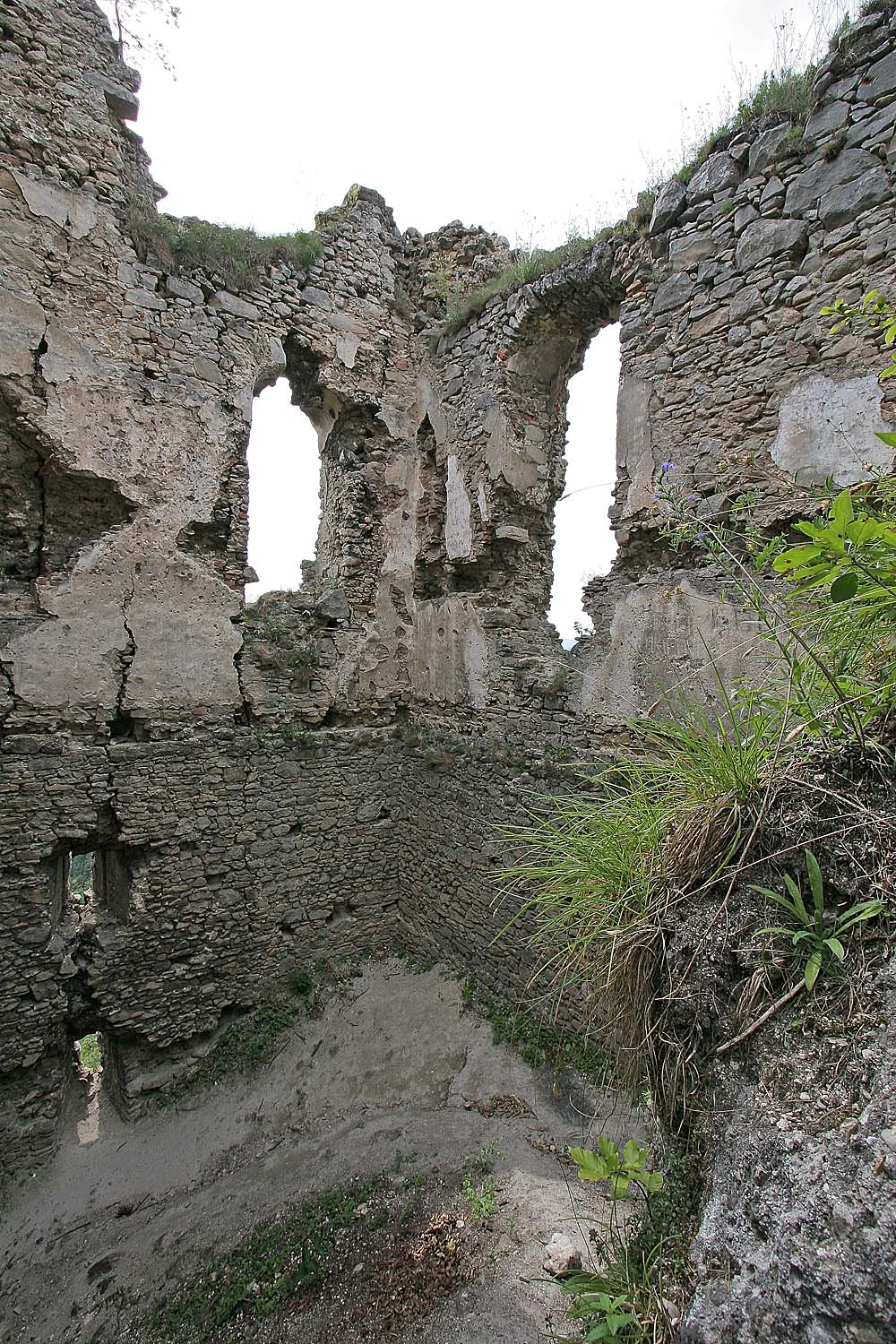 Castle Hričovský hrad